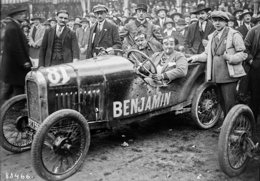 Violette Morris au Bol d'or sur cyclecar Benjamin en 1923 (circuit des Loges de Saint-Germain-en-Laye)